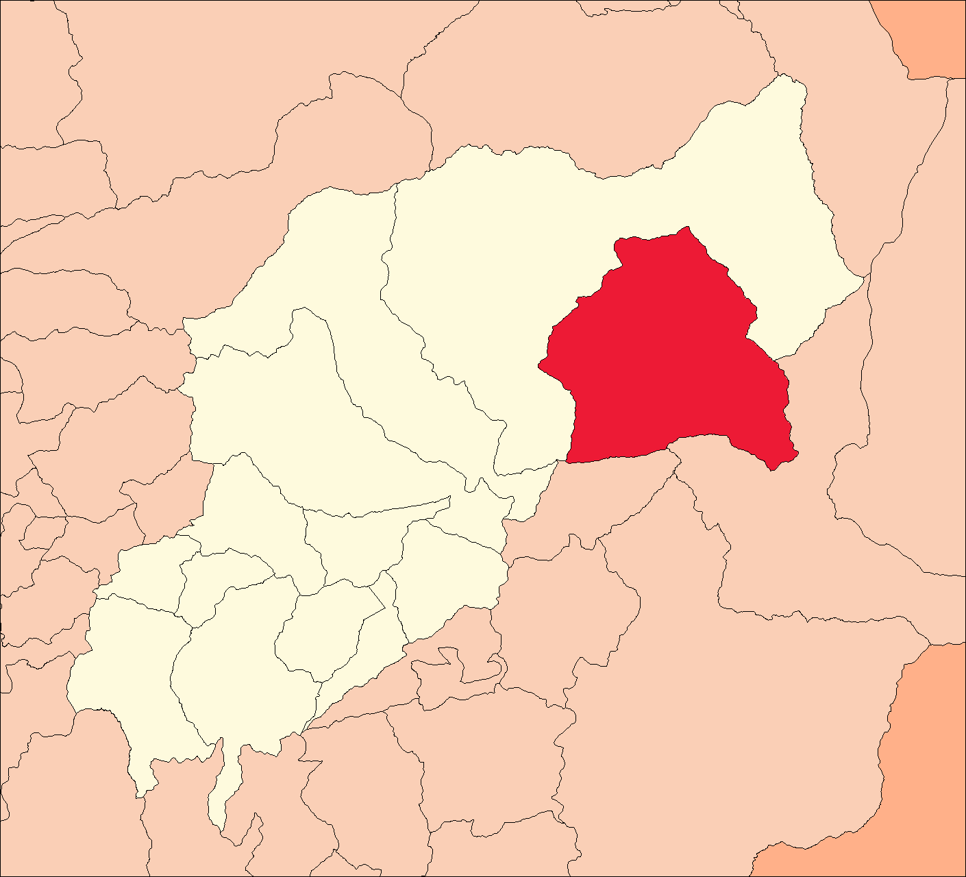 Área del distrito de San Pablo de Pillao.